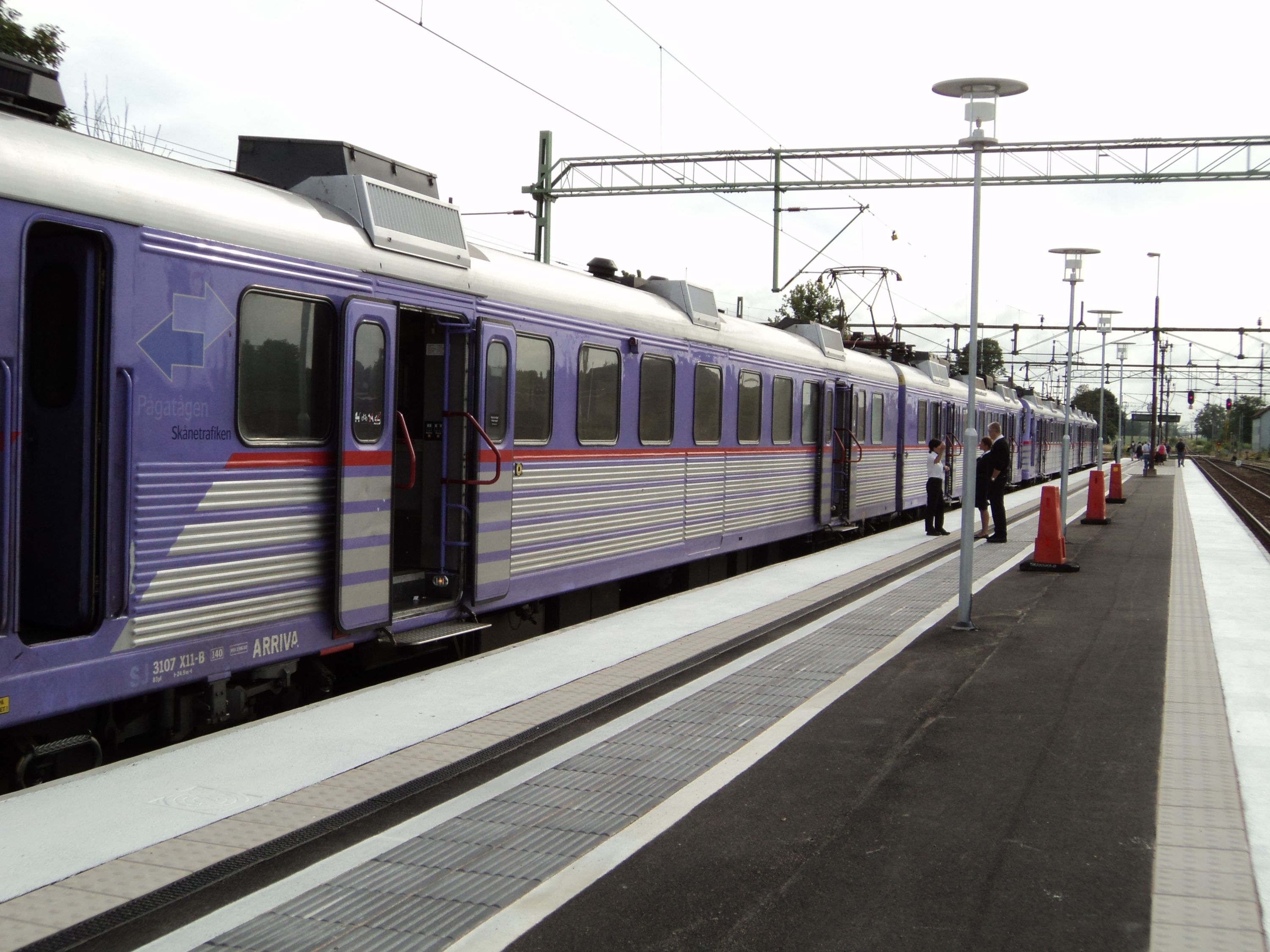 Ett pågatåg mot Helsingborg står inne på Teckomatorps station i juli 2010.